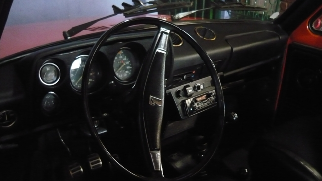 habitaculo